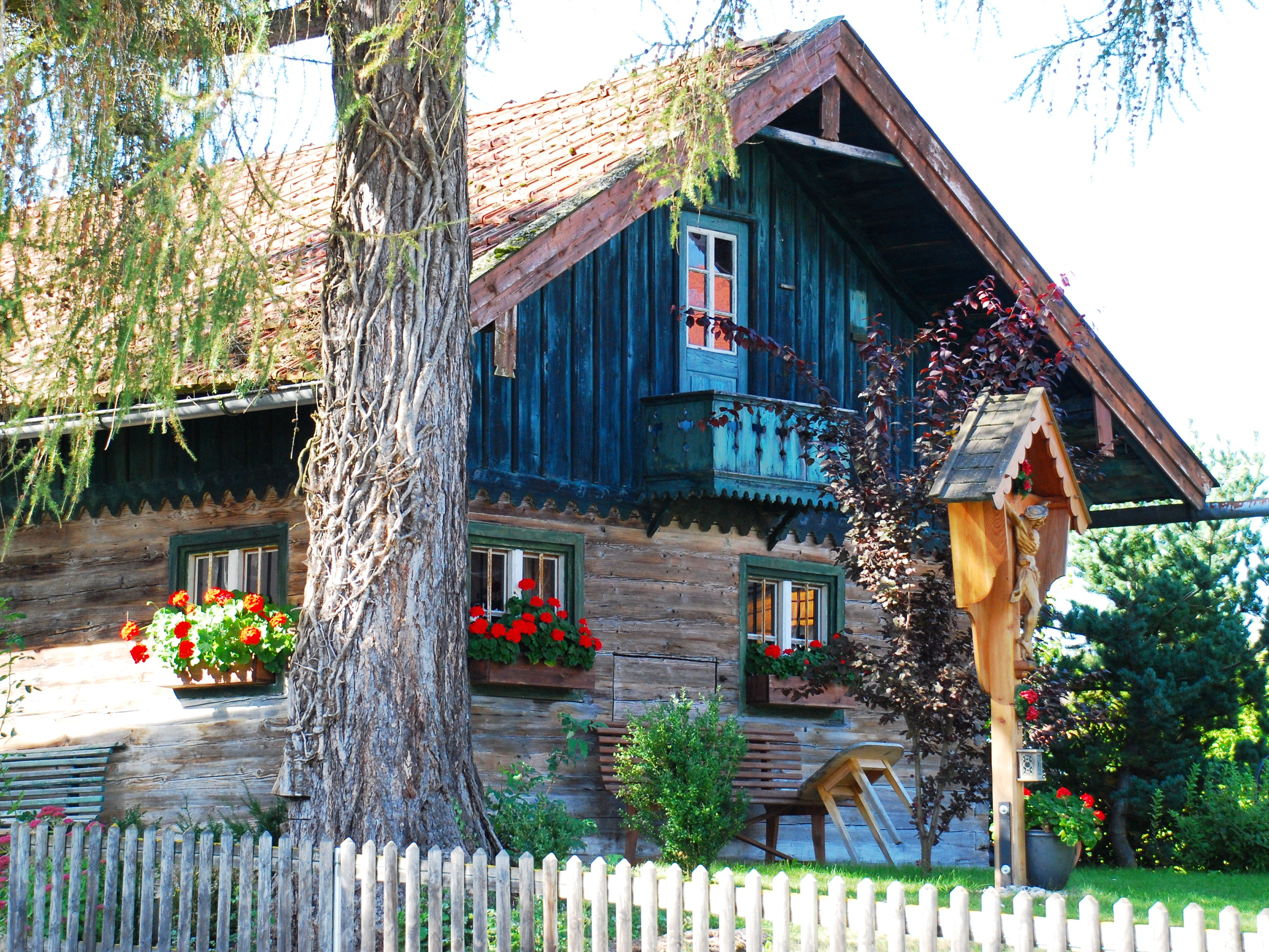 Troadkasten in der Oberlandstraße 43 in Lochhofen, Ortsteil von Sauerlach, Landkreis München, Regierungsbezirk Oberbayern, Bayern. Als Baudenkmal in der Bayerischen Denkmalliste aufgeführt. Foto gemäß den Vorgaben zur Panoramafreiheit von öffentlichem Verkehrsgrund aus aufgenommen.